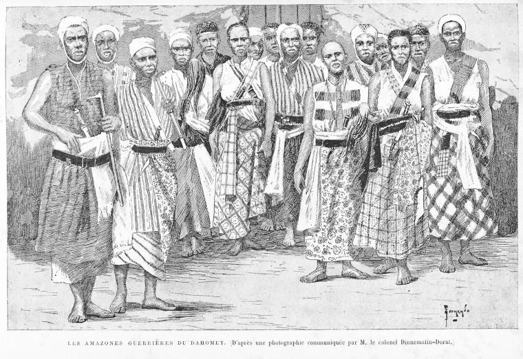 Les amazones guerrières du Dahomey. (D'après une photographie communiquée par M. le colonel Dinnematin-Dorat.) (1890)